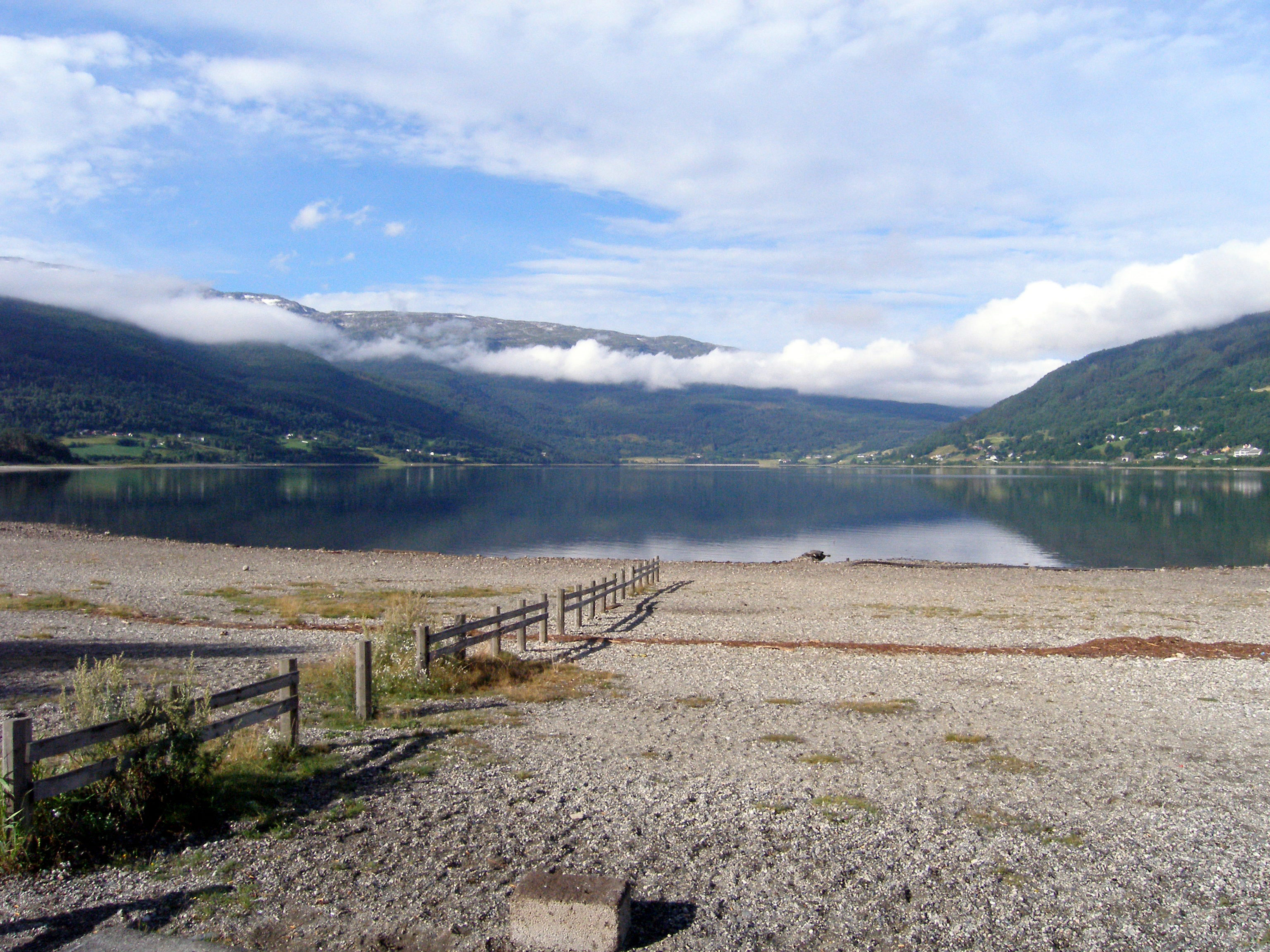 Lake Vangsvatnet, as viewed from Voss.